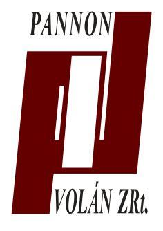 Pannon Volán logo